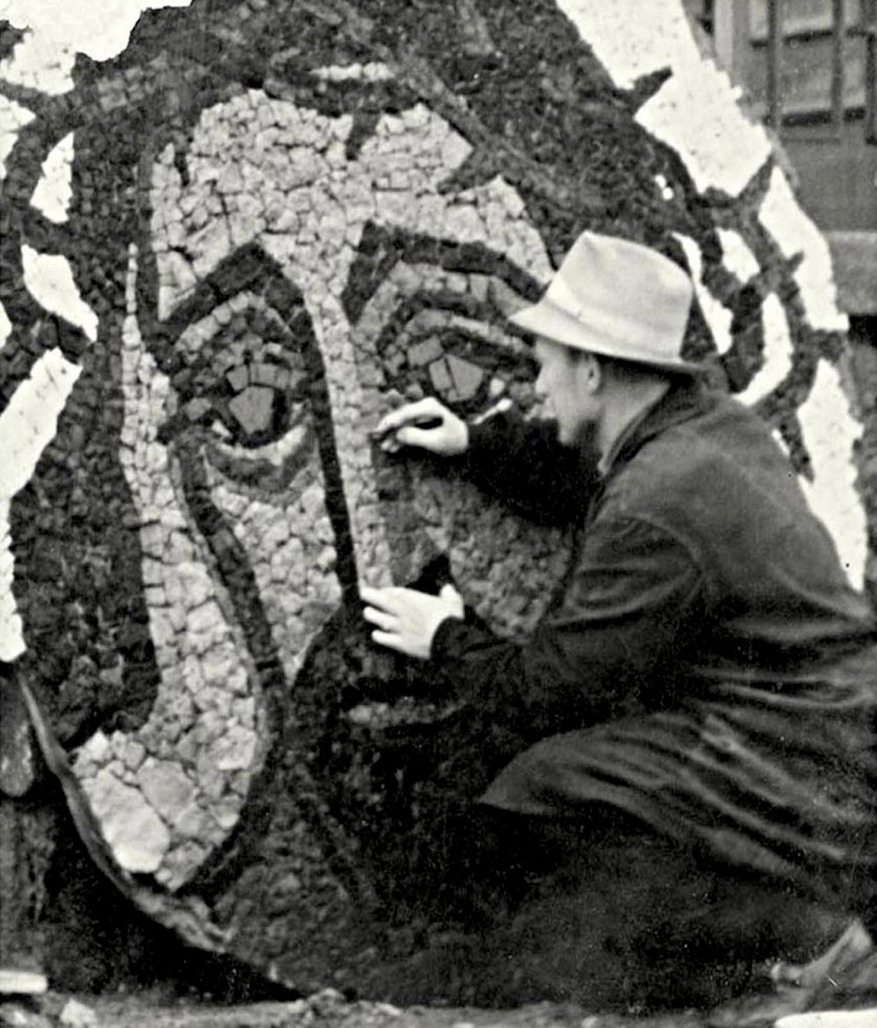 A. Matuliauskas vyresnysis prie mozaikos Rupintojelis, Klaipėda, 1960.